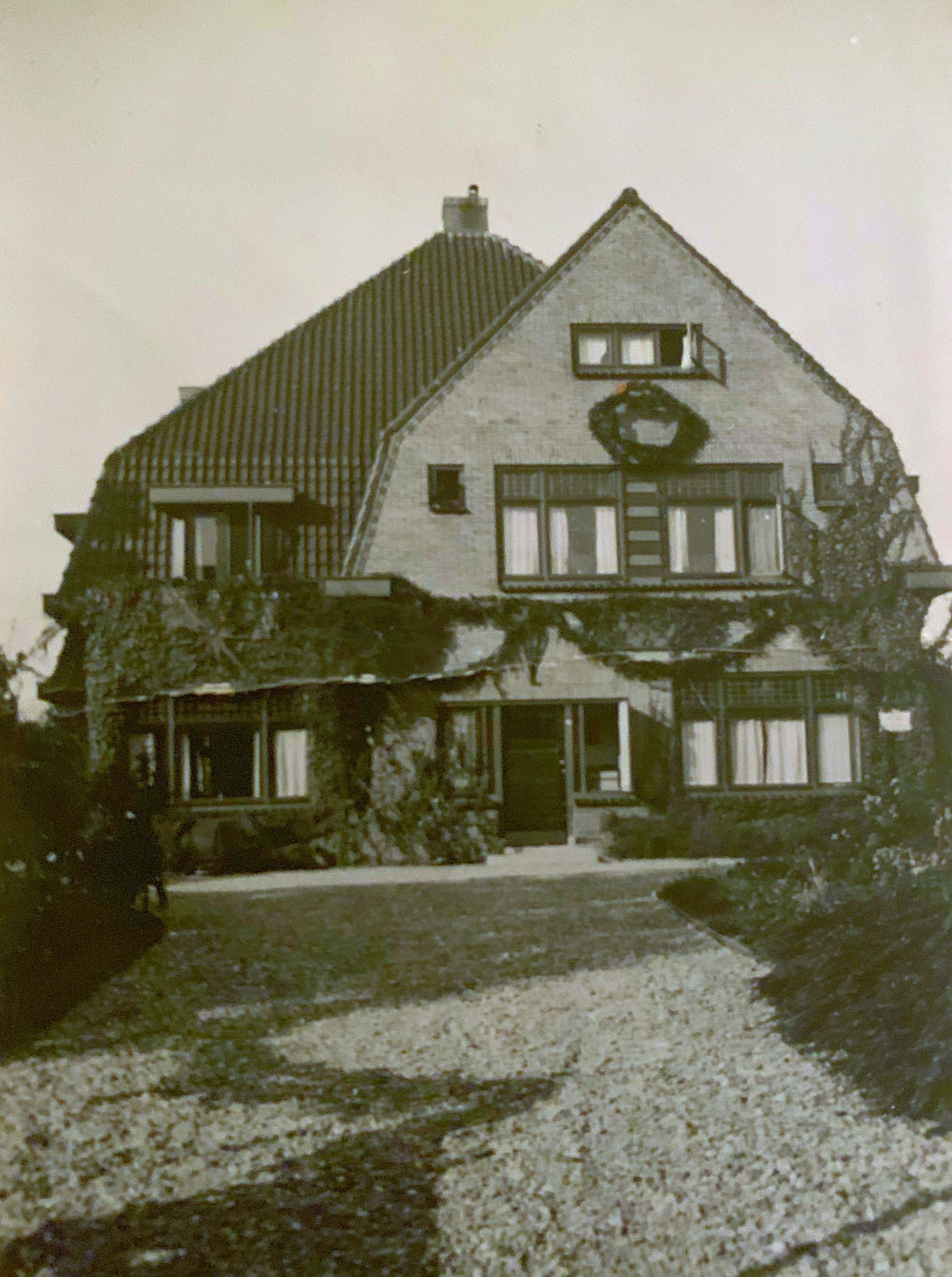 Markant huis in Zuidland